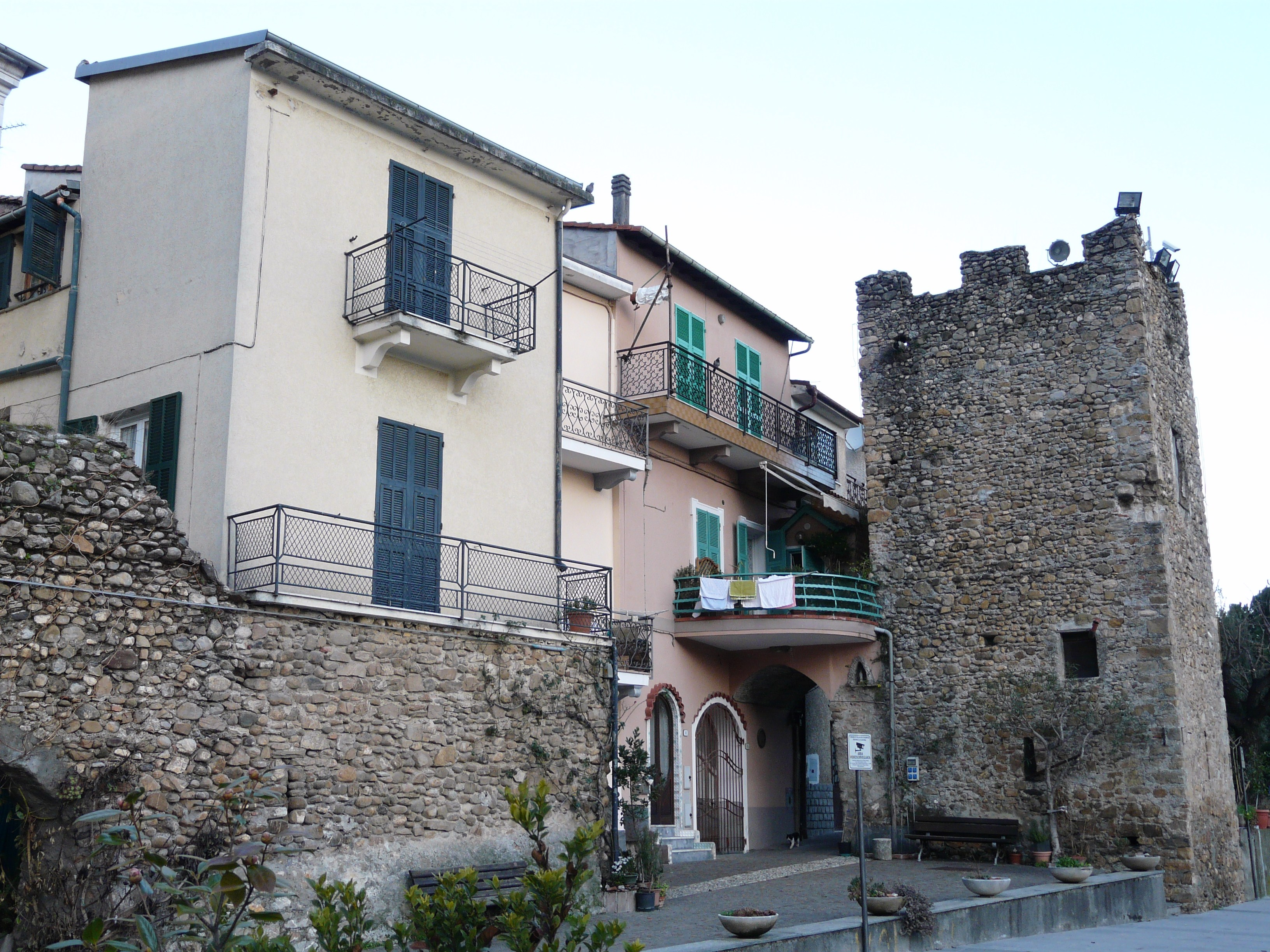 Mura e torri di Villanova d'Albenga, Liguria, Italia